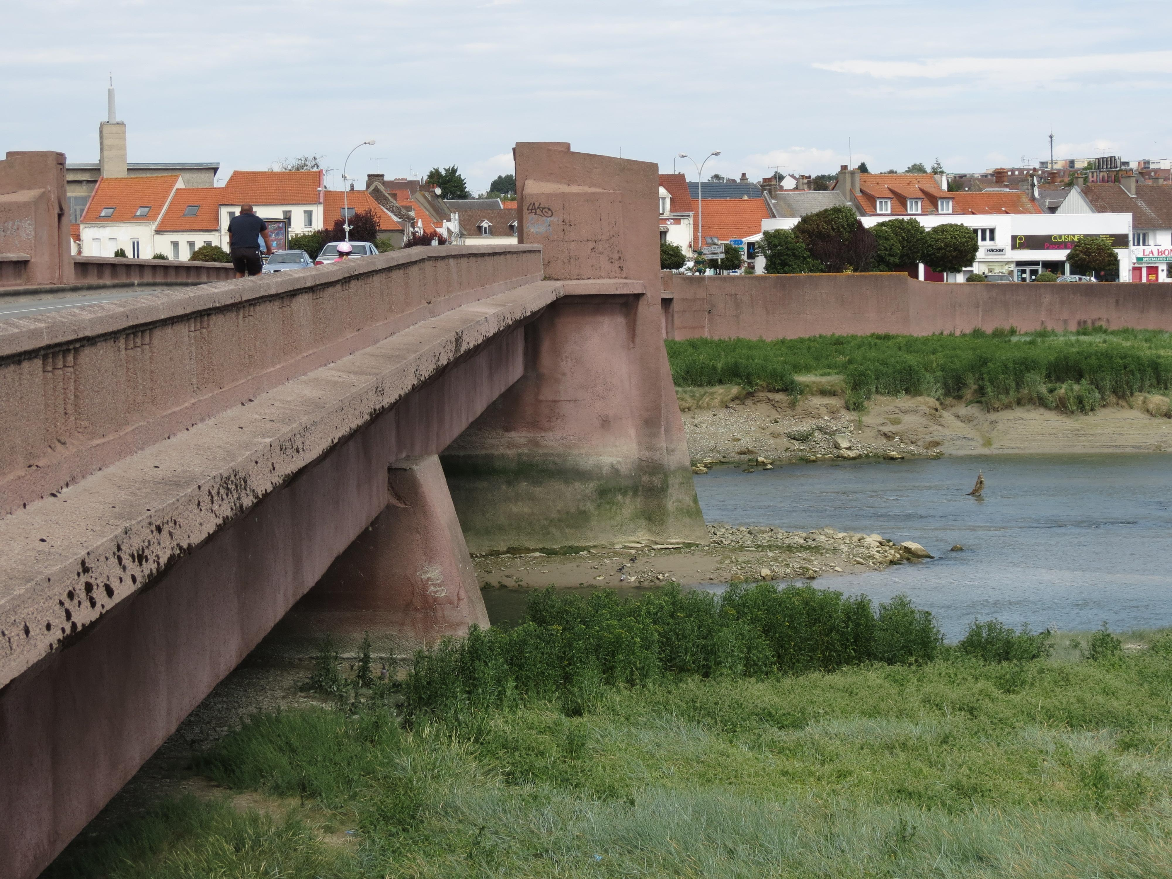 Brücke über die Canche in Étaples.